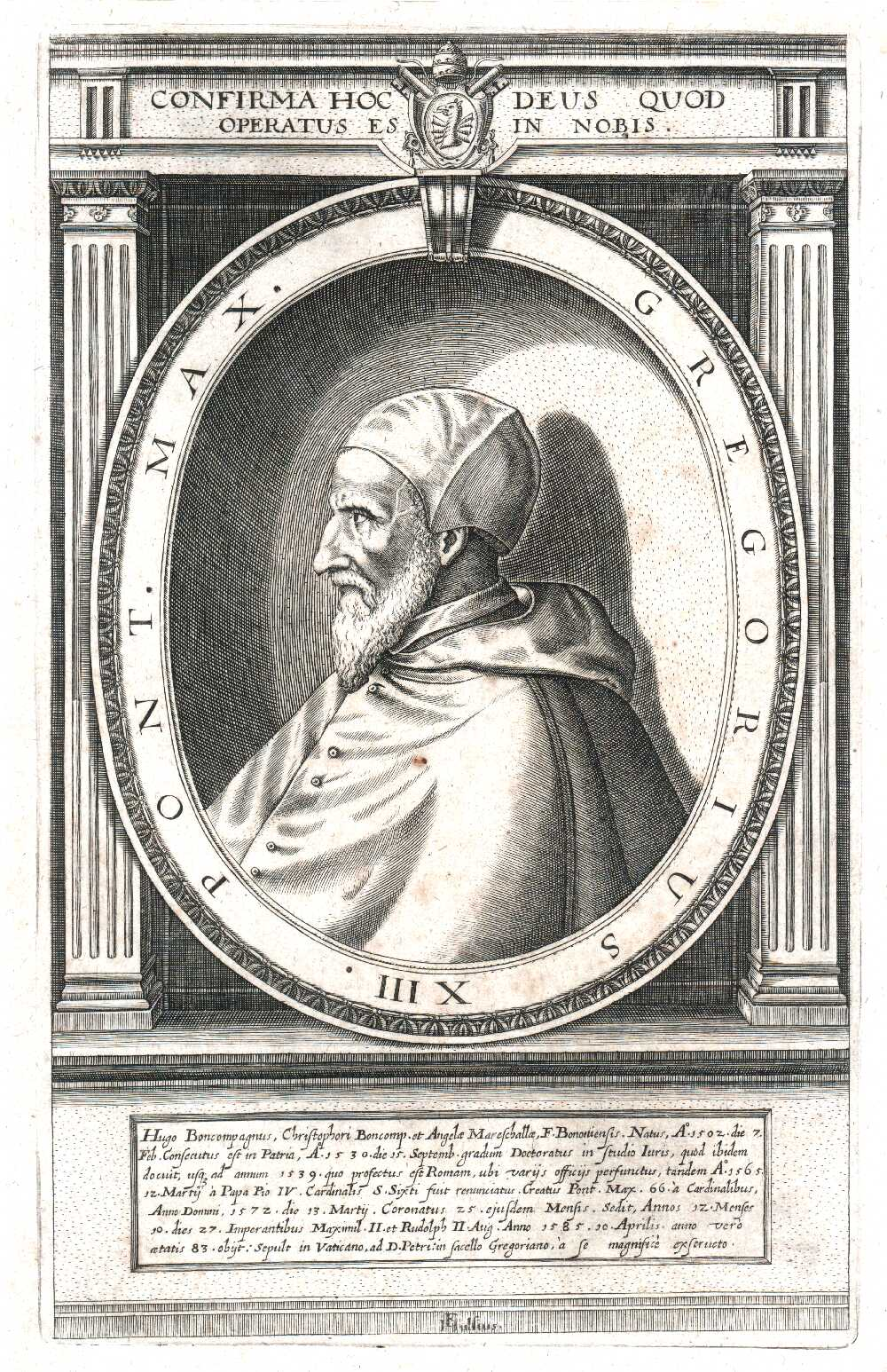 Gregory XIII, Pope (1502 - 1585)